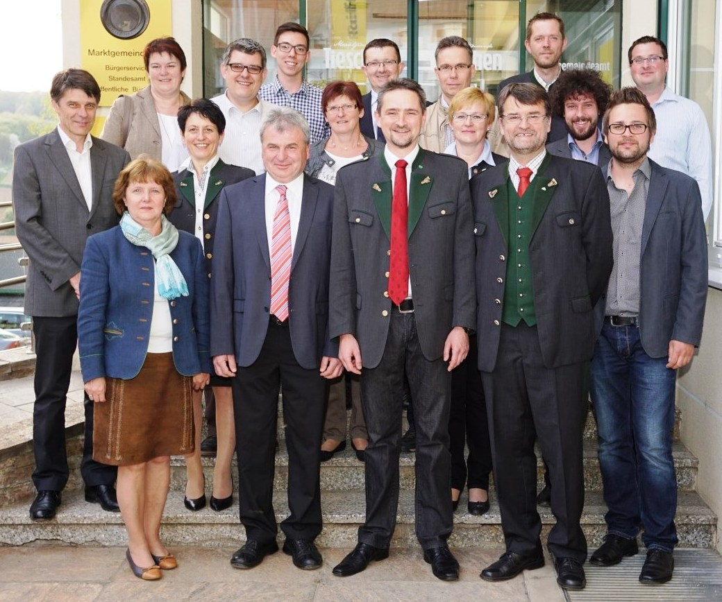 Gemeinderat der Marktgemeinde Tieschen nach der Gemeinderatswahl 2015. Im Vordergrund in der Bildmitte mit der roten Krawatte Bürgermeister Martin Weber.